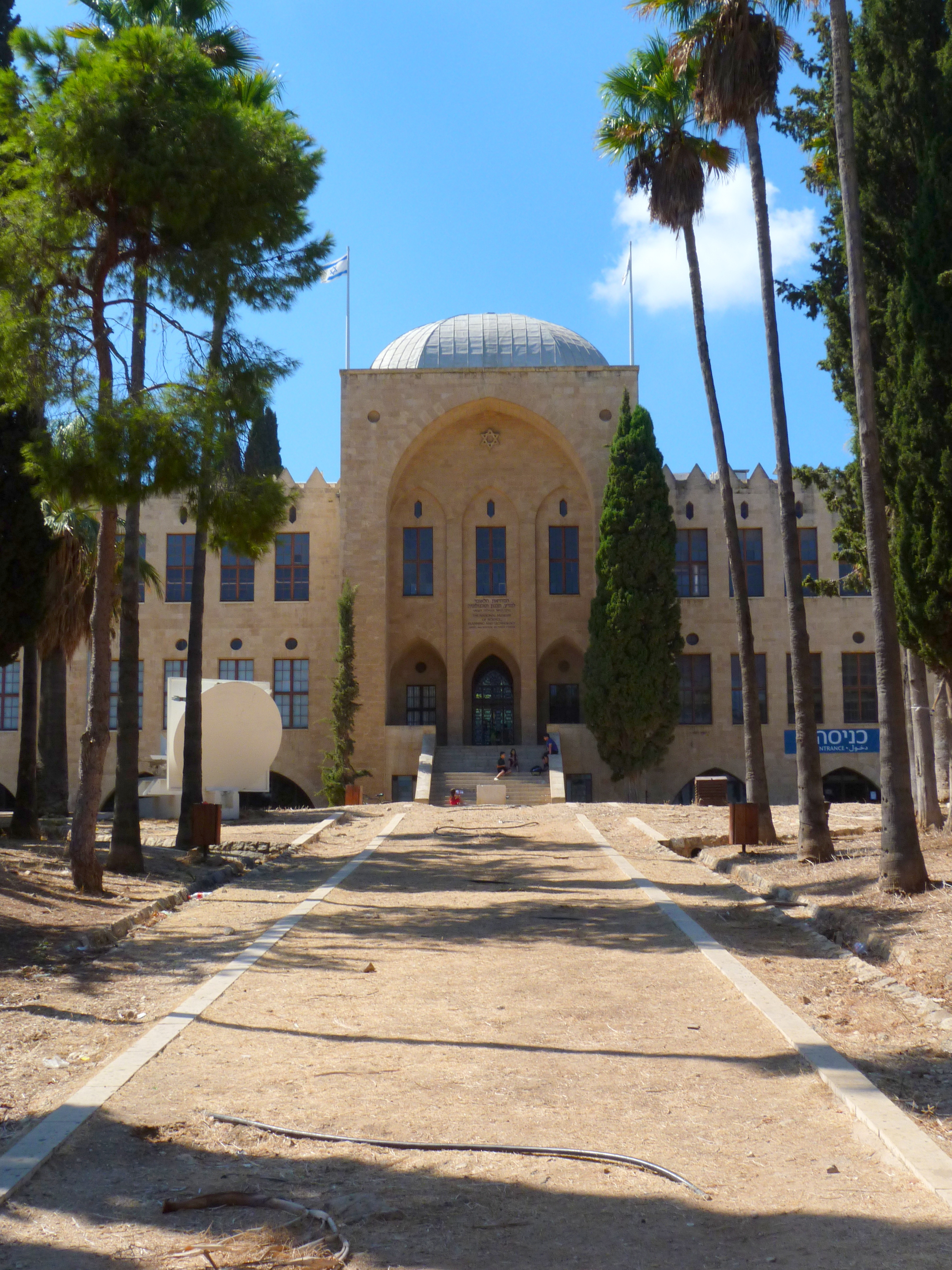 בניין הטכניון ההיסטורי בשכונת הדר כרמל בחיפה